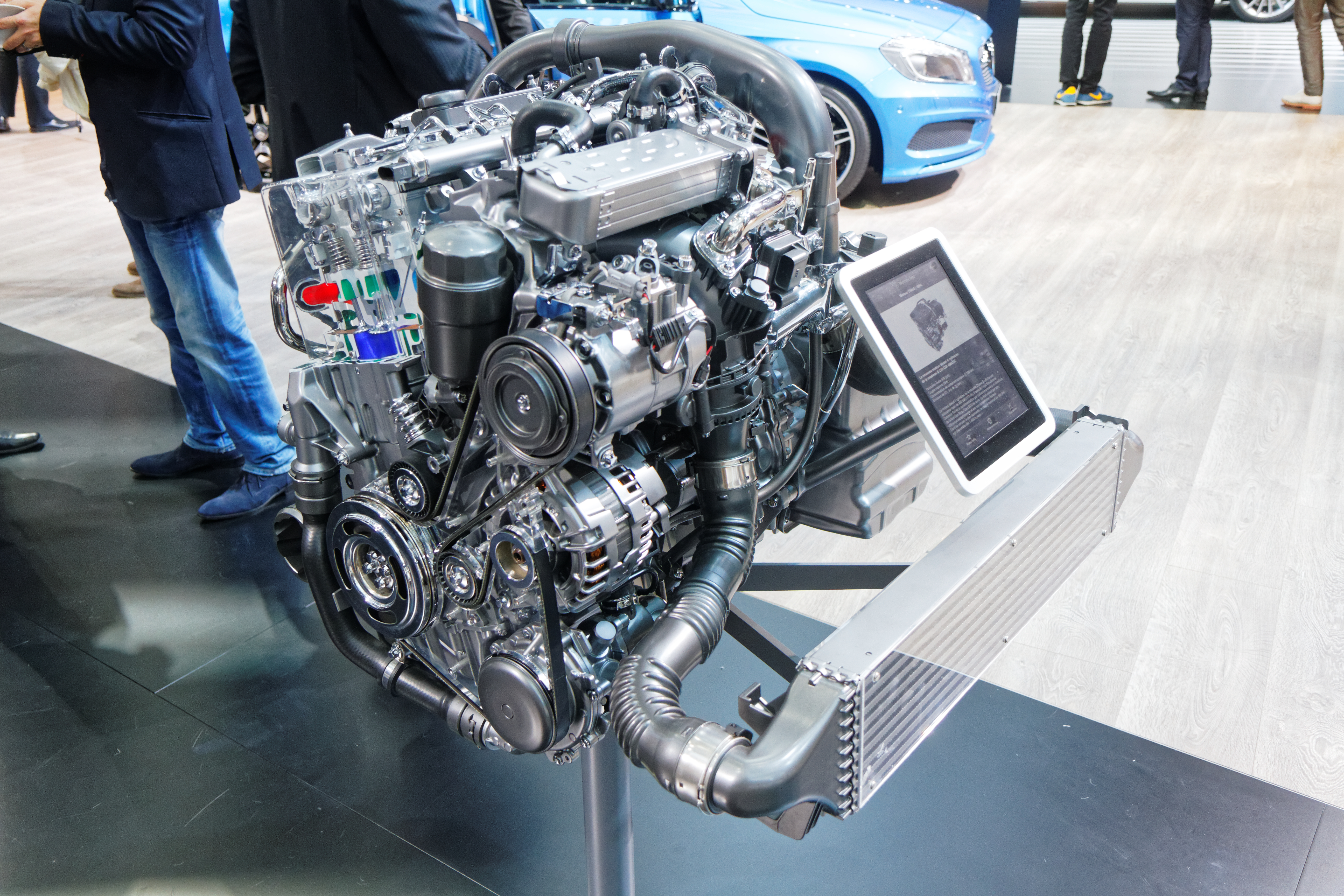 Un moteur Mercedes OM651 MFA présenté lors du mondial de l'automobile de Paris 2014.